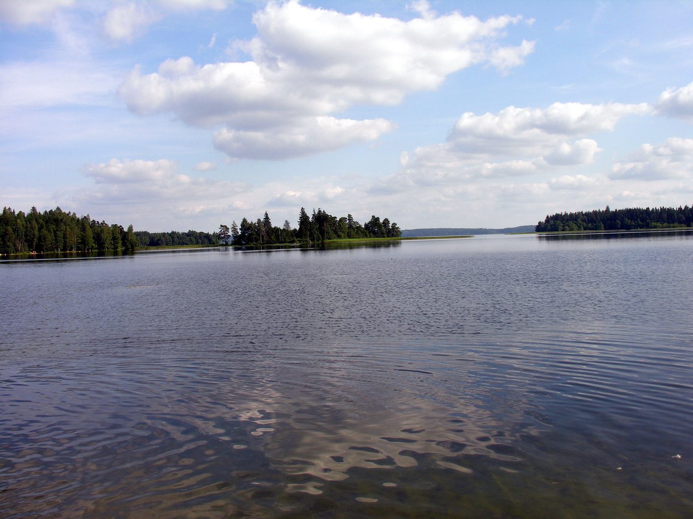 Žemaitėška: bat-smg:Platielių ežers (lt. Platelių ežeras). bat-smg:Žemaitėjės naciuonalėnis parks Puortegrapėje Algirda, 2007-08-06, bat-smg:Žemaitėjė